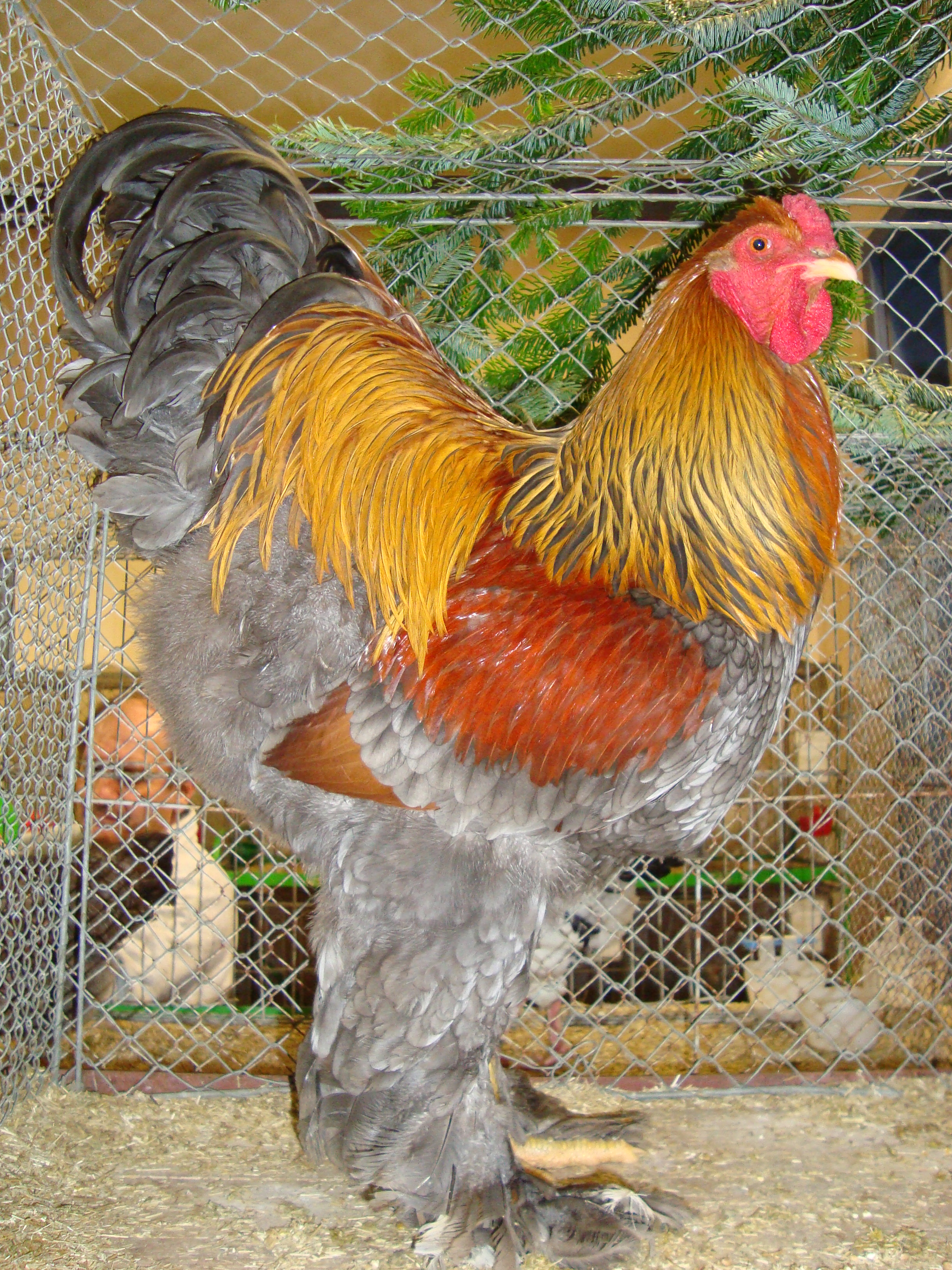 Brahma Hahn blau-rebhuhnfarbiggebändert mit Höchstnote V97